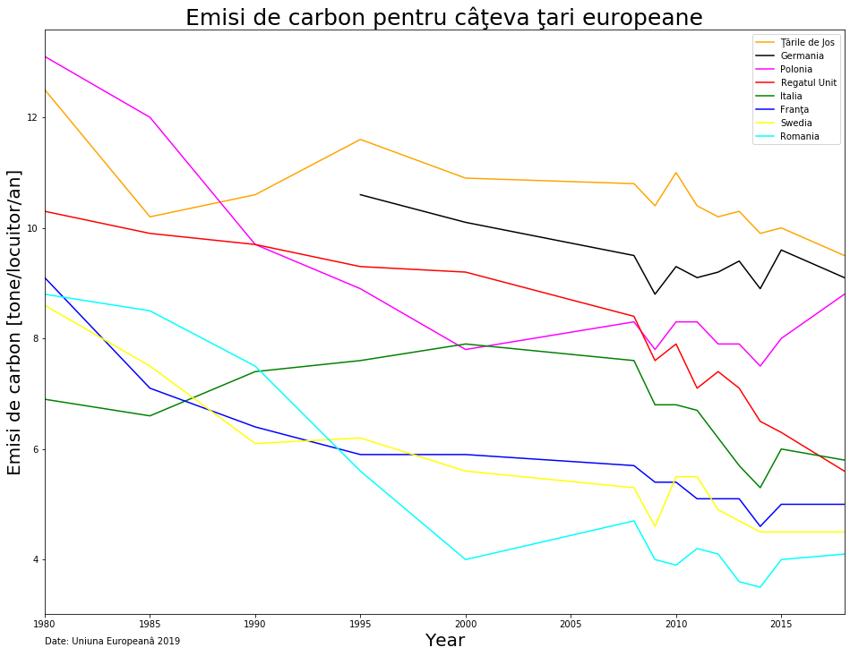 Emisi de carbon pentru câţeva ţari europene din 1980.